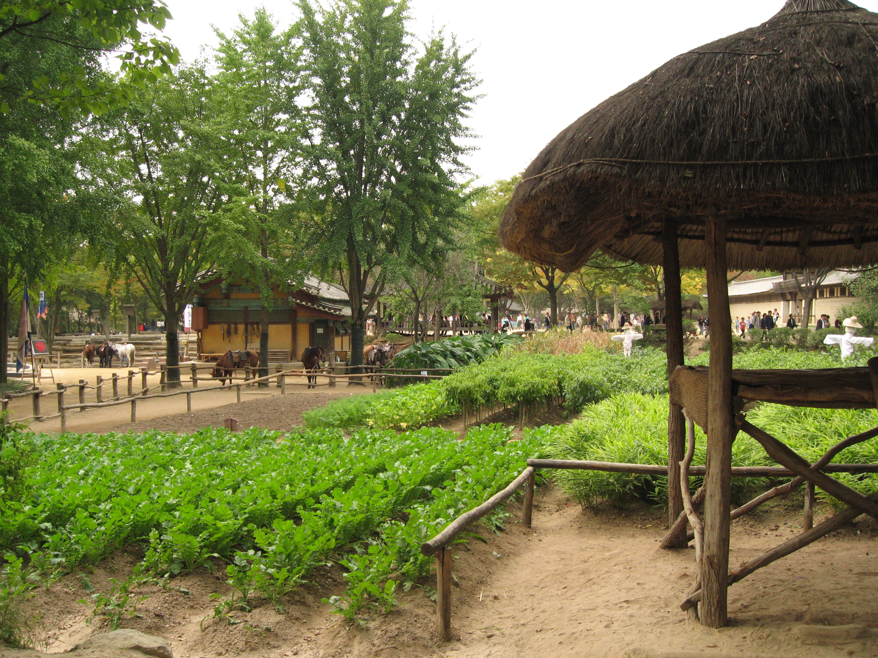 Korean Folk Village